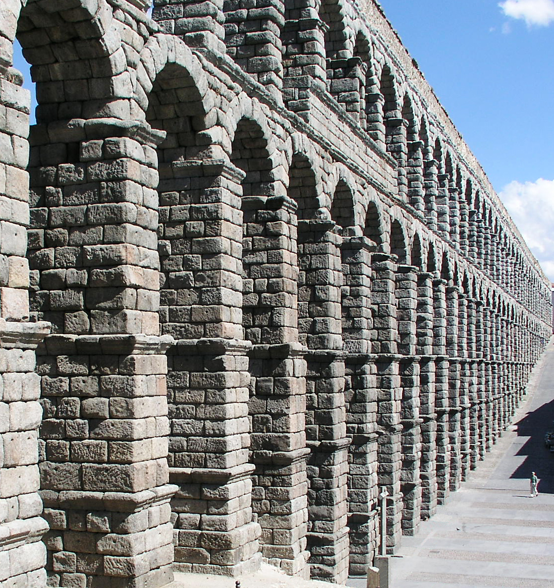 Acueducto, Segovia, Spain